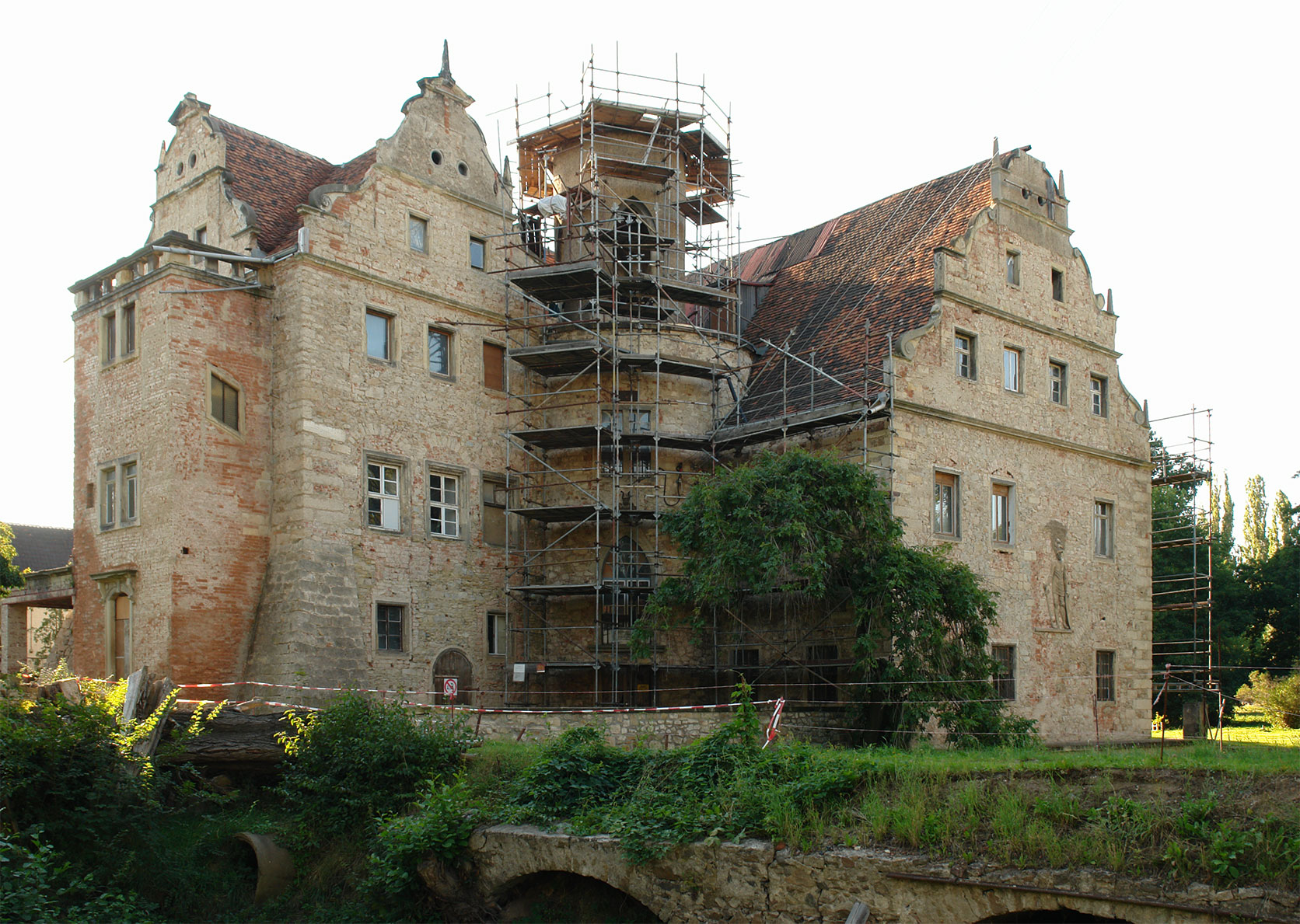 Pfad+Objekt: Deutschland / Sachsen_BL / Dresden_RB / Meißen_Lk / Niederau - Oberau, Schloss Oberau. Tags: B101 S80 S177 Bauwerk Gebäude Schloss